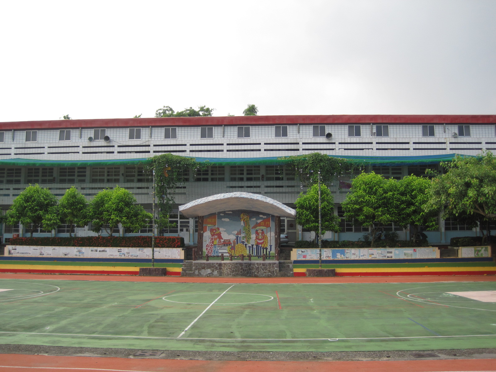 高雄市內門區西門國民小學。